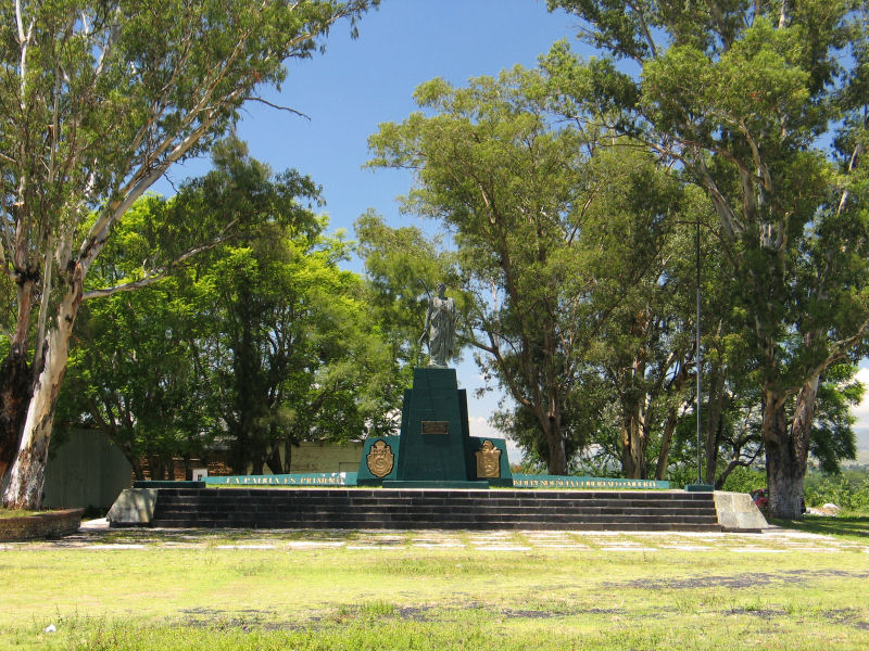 Monumento erigido no local onde Guerrero foi fuzilado em Cuilapam de Guerrero, Oaxaca. 2004